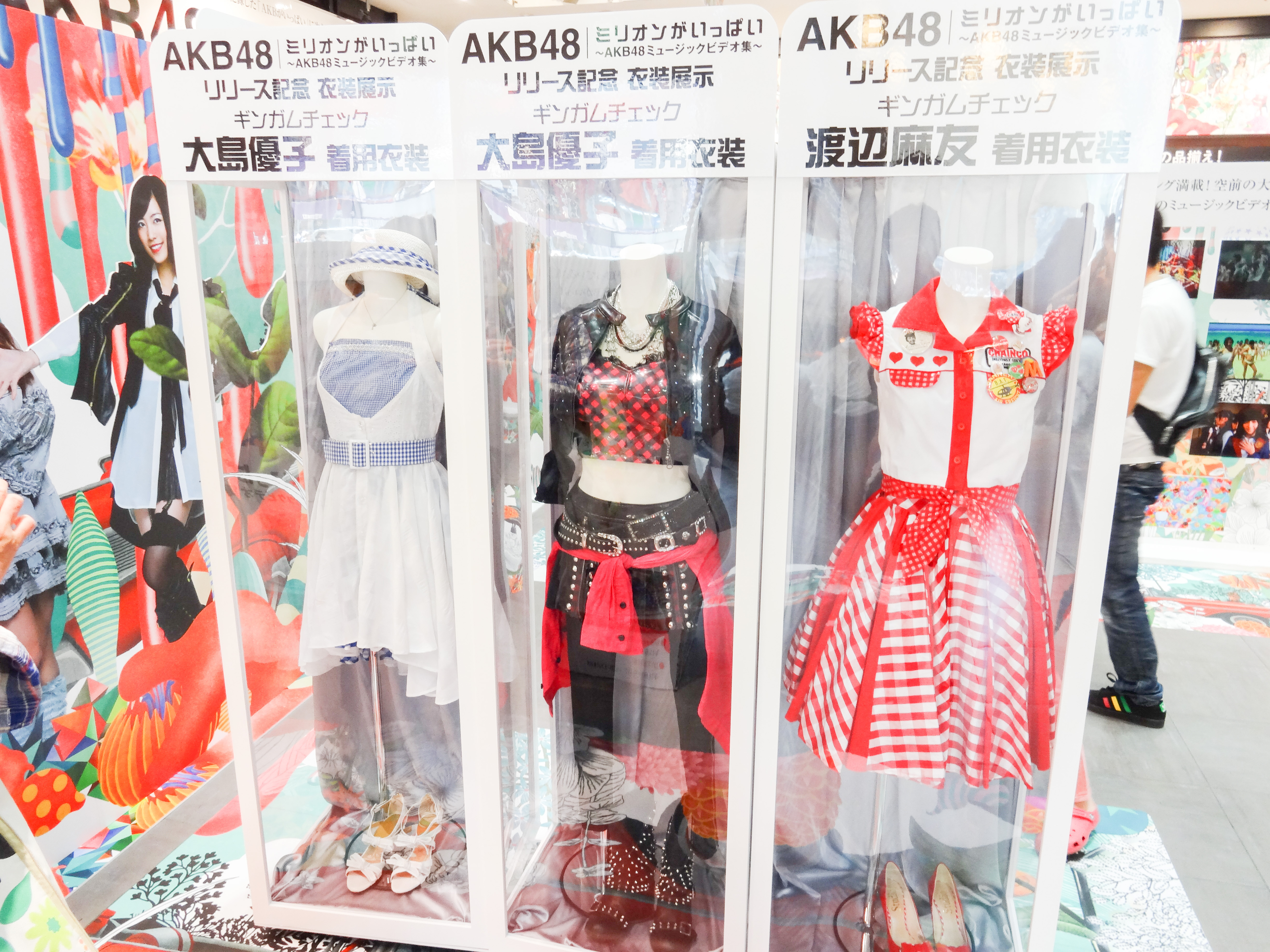 Shibuya Tsutaya AKB48 衣装 大島優子 渡辺麻友 ギンガムチェック ミュージックビデオ